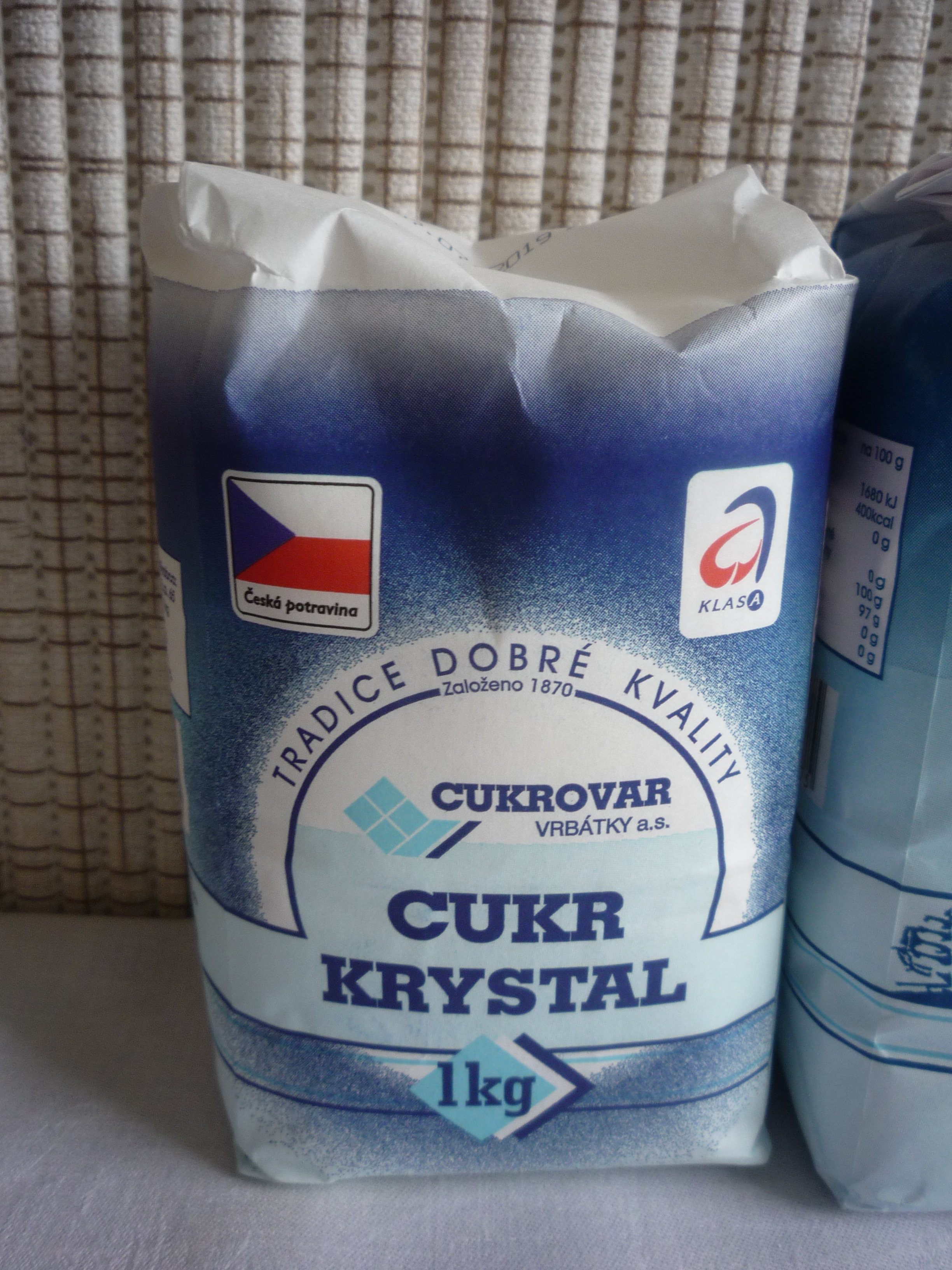 Autor fotografie Jiří Zelenka.Cukr krystal (Cukrovar Vrbátky a.s.) Czech Republic.